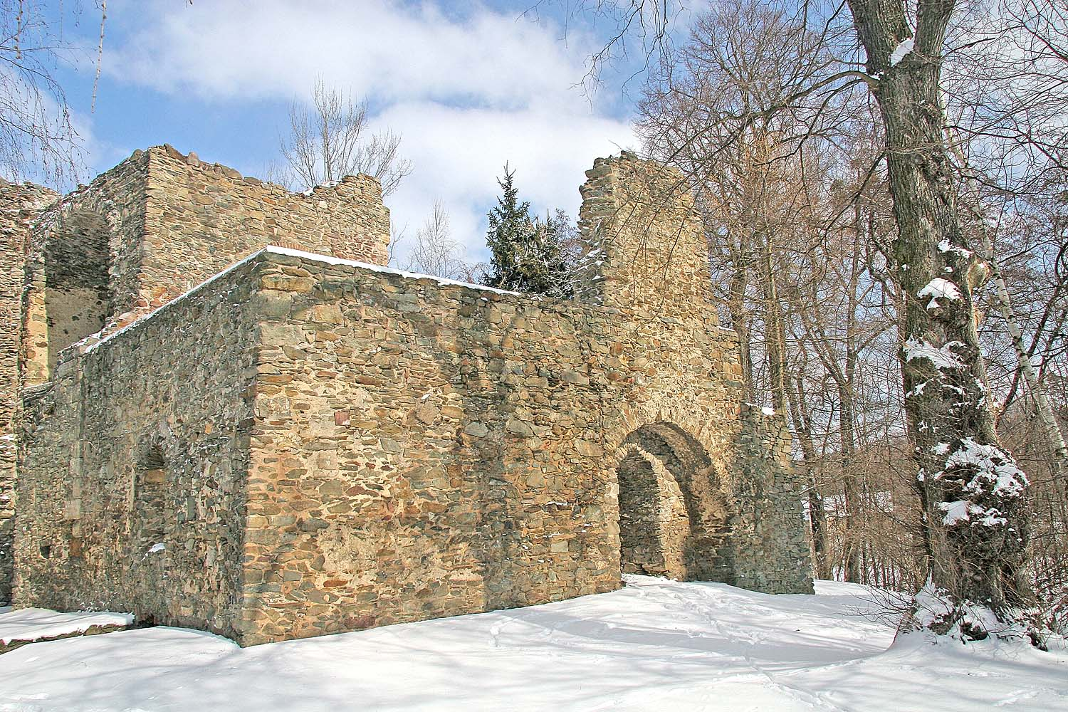 Tvrz ve Svojšicích, District Pardubice autor:Prazak date: 13. 3. 2006